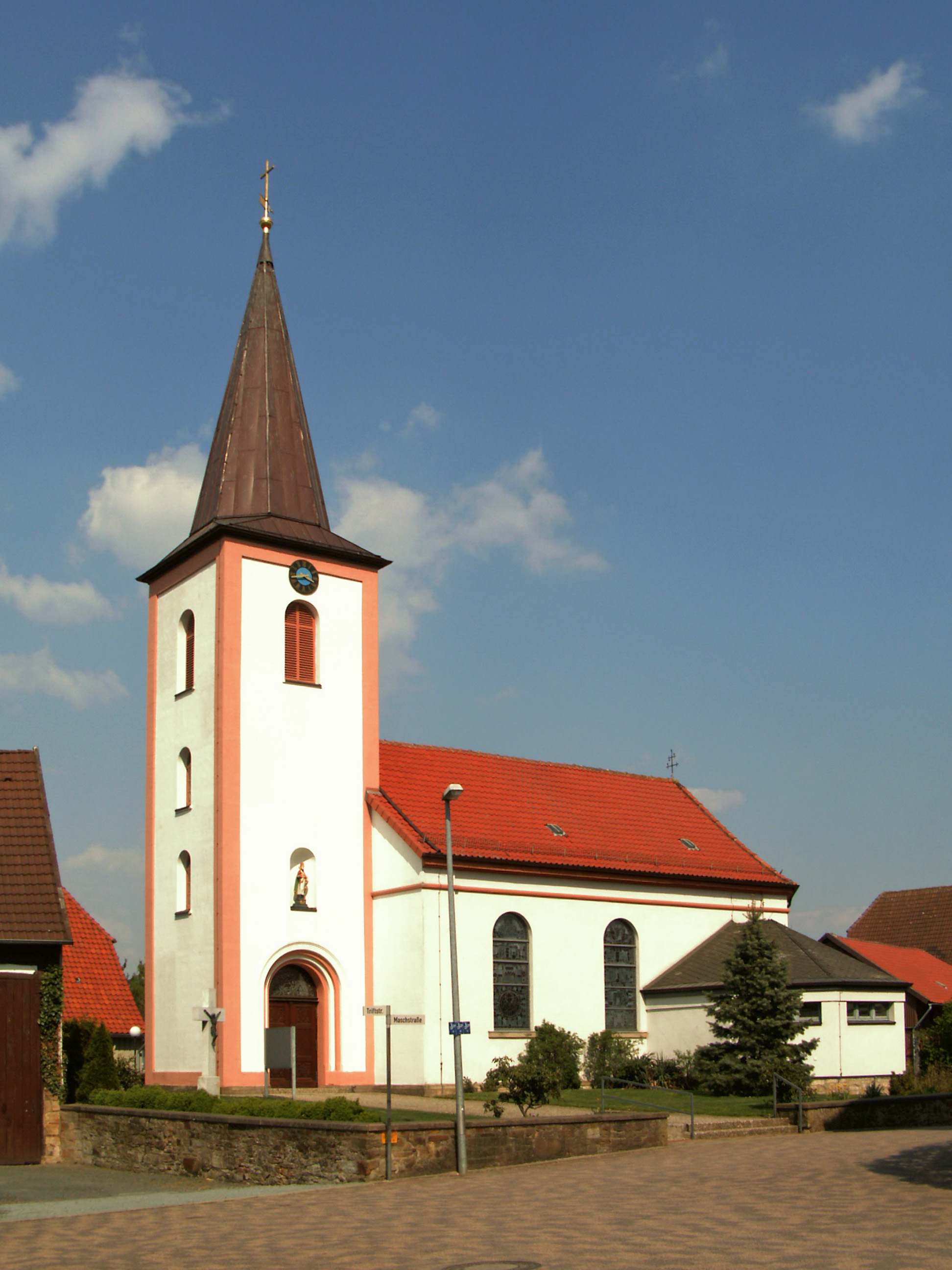 Katholische Kirche St. Nikolaus in Egenstedt, Ortsteil von Diekholzen